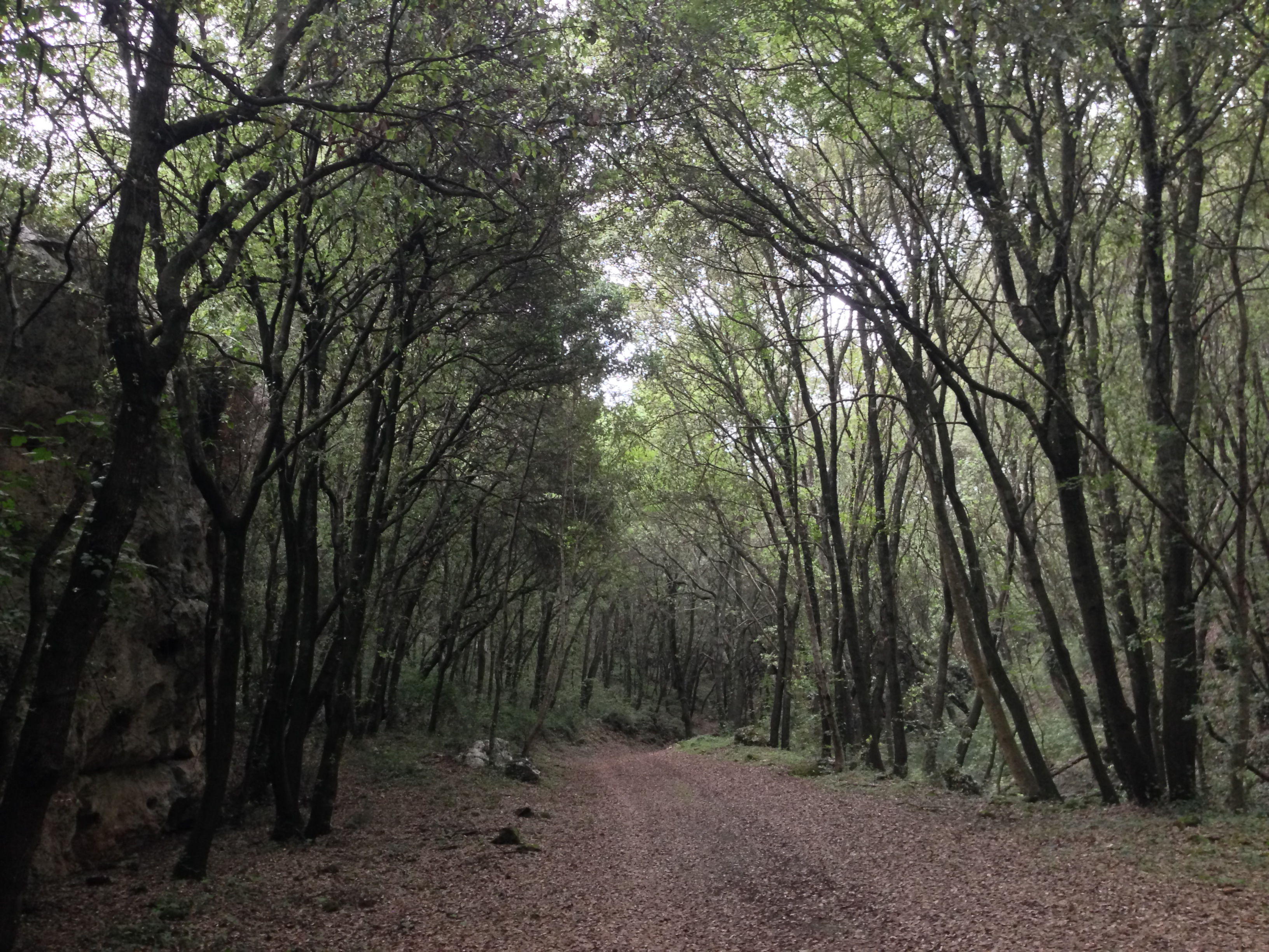 Sentiero a Giarranauti